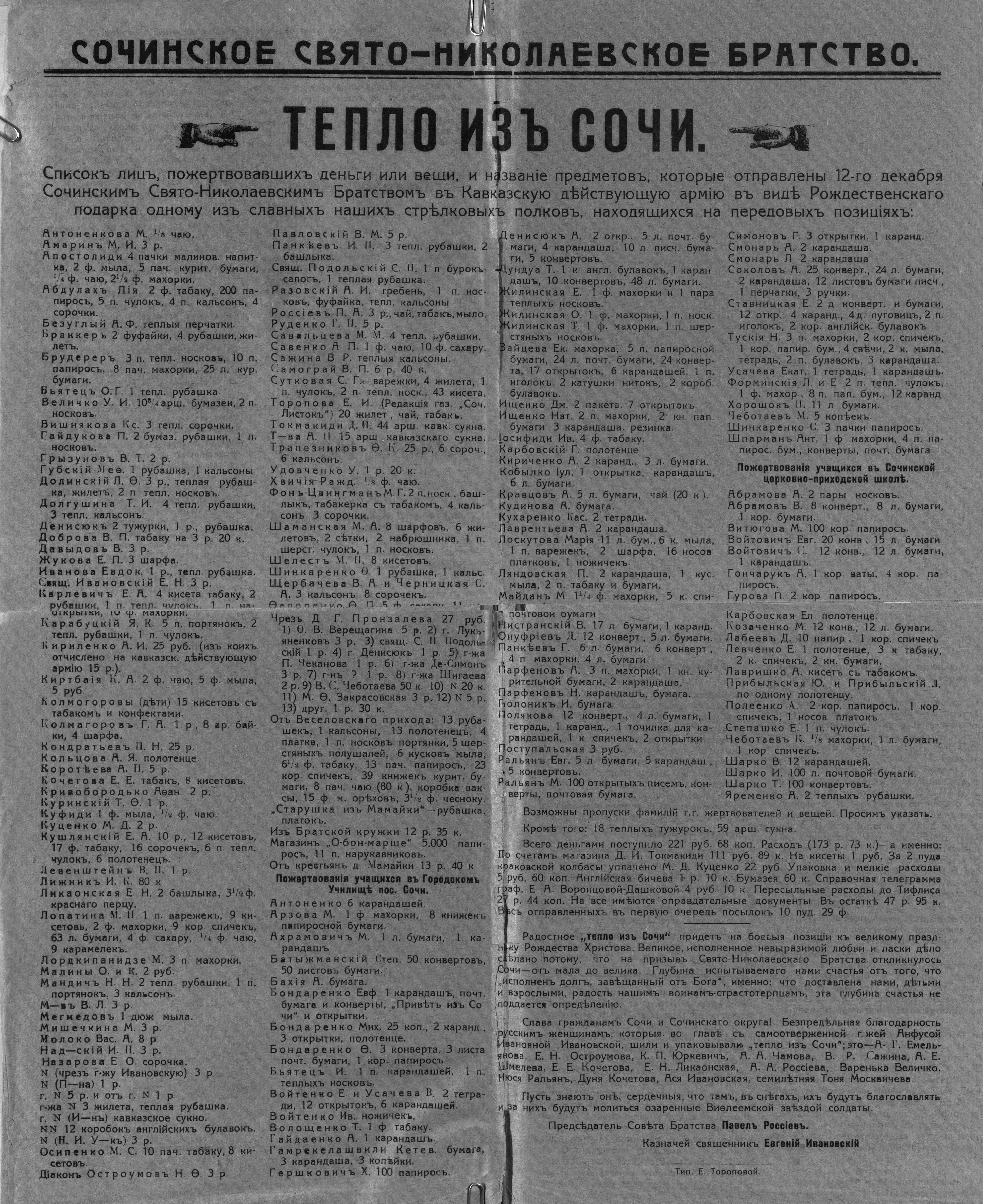 Приложение к журналу "Известия Сочинского Свято - Николаевского Братства" - редактор Павел Россиев